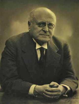 Rektor, borgmester Ernst Kaper (14. juni 1874 - 10. juli 1940), skolemand kendt for tysk.